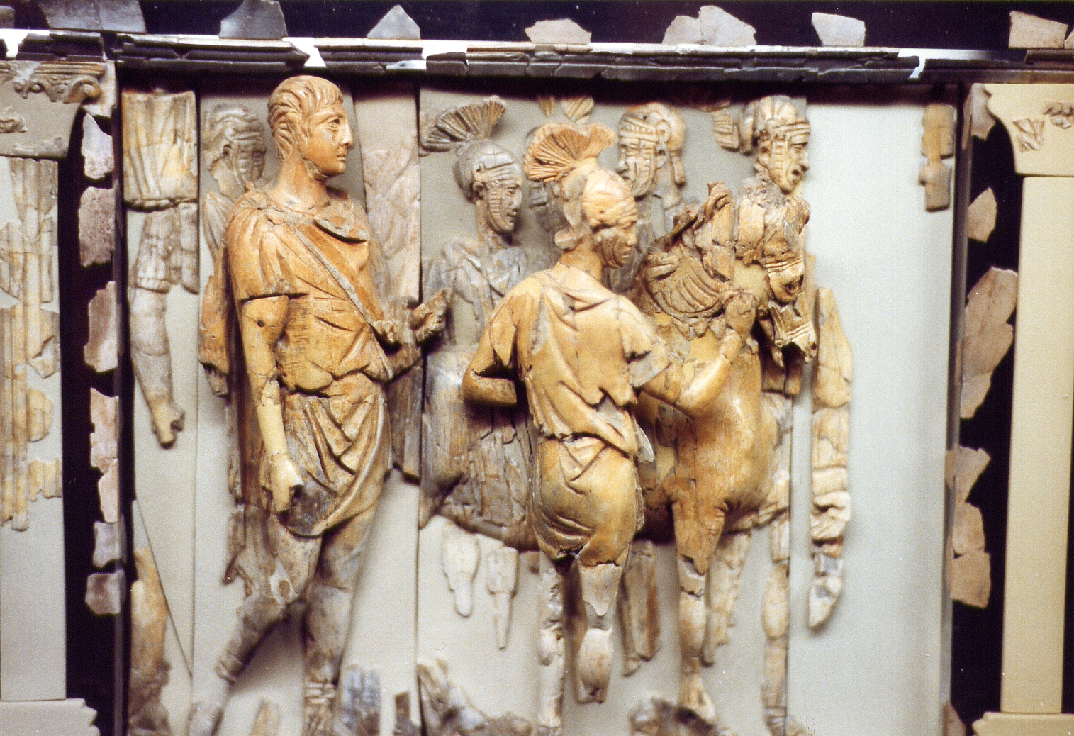 Teil eines Elfenbeinfrieses, Trajan (links) im Kampf gegen die Parther, Ephesus-Museum Selçuk, Westtürkei